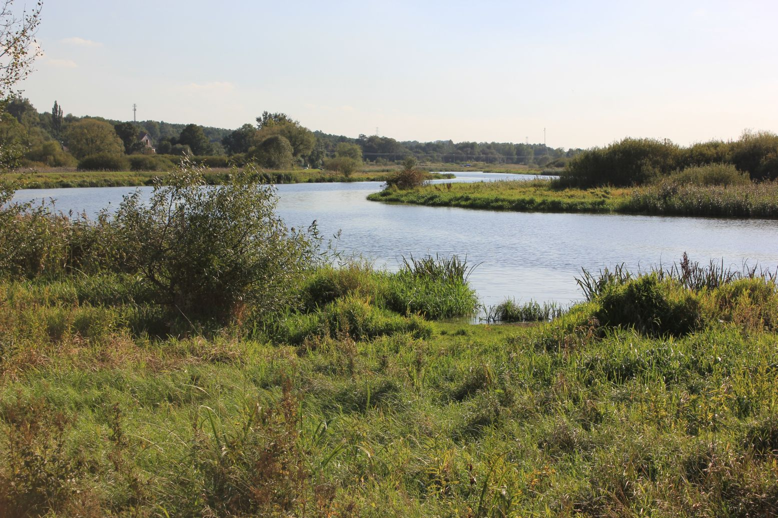 Szczecin - Kanał Klucki